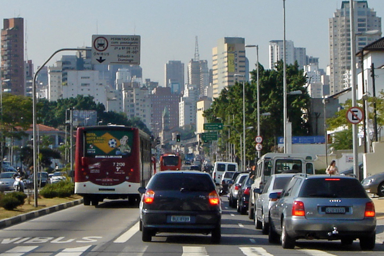 Traffic congestion, Sao Paulo, Brazil